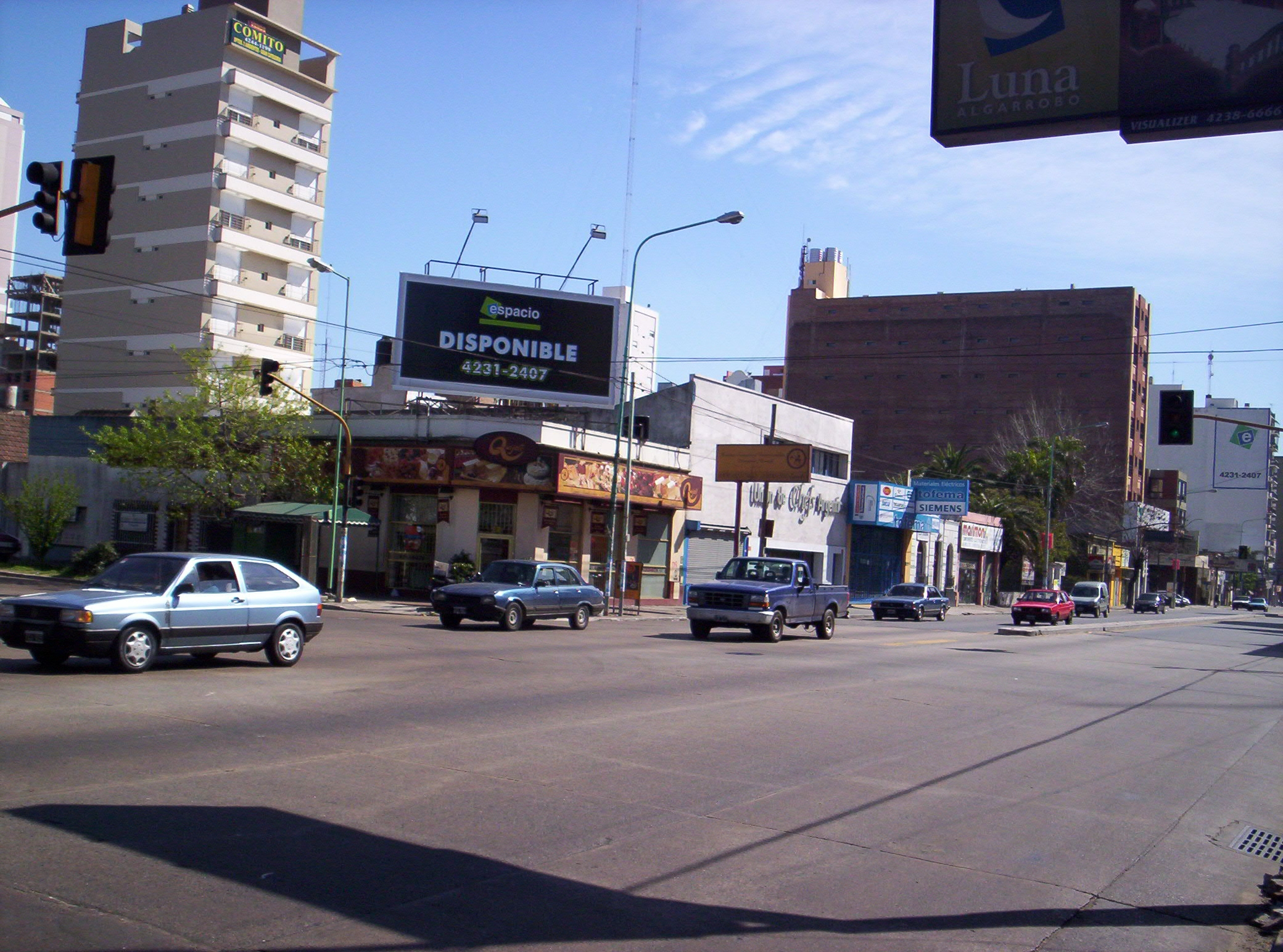 Foto de la intersección de las avenidas Colombres e Hipólito Yrigoyen en Lomas de Zamora, Buenos Aires, Argentina.